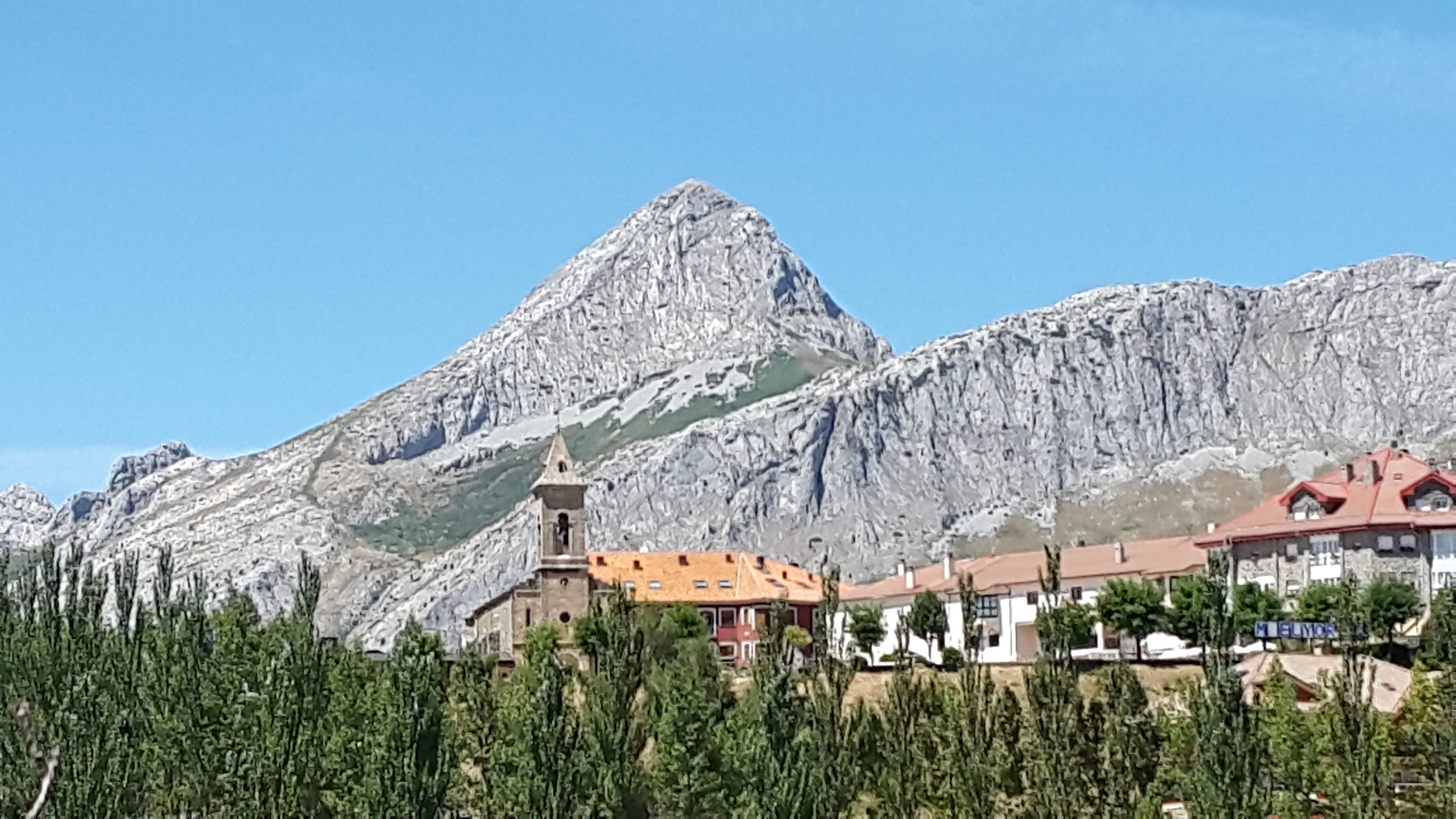 El Yordas desde Riaño